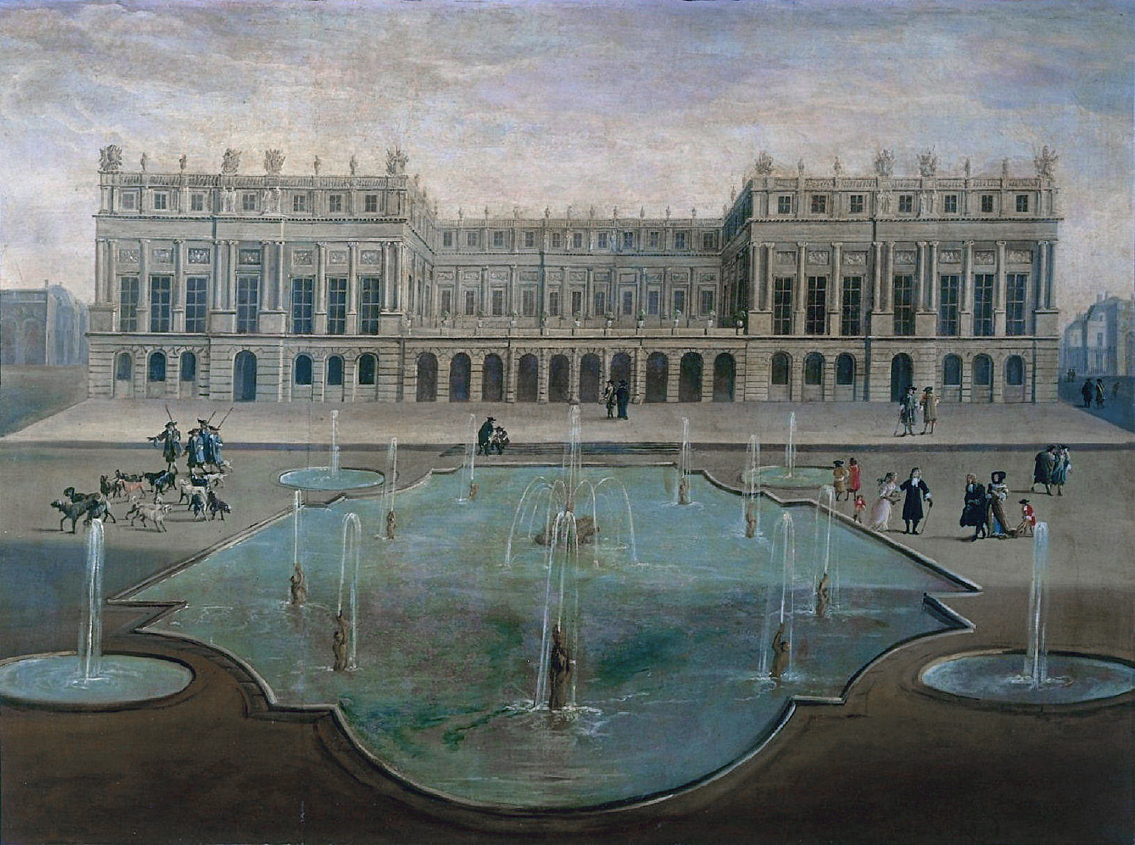 Ansicht des Schlosses Versailles um 1675, vor dem Bau der Spiegelgalerie